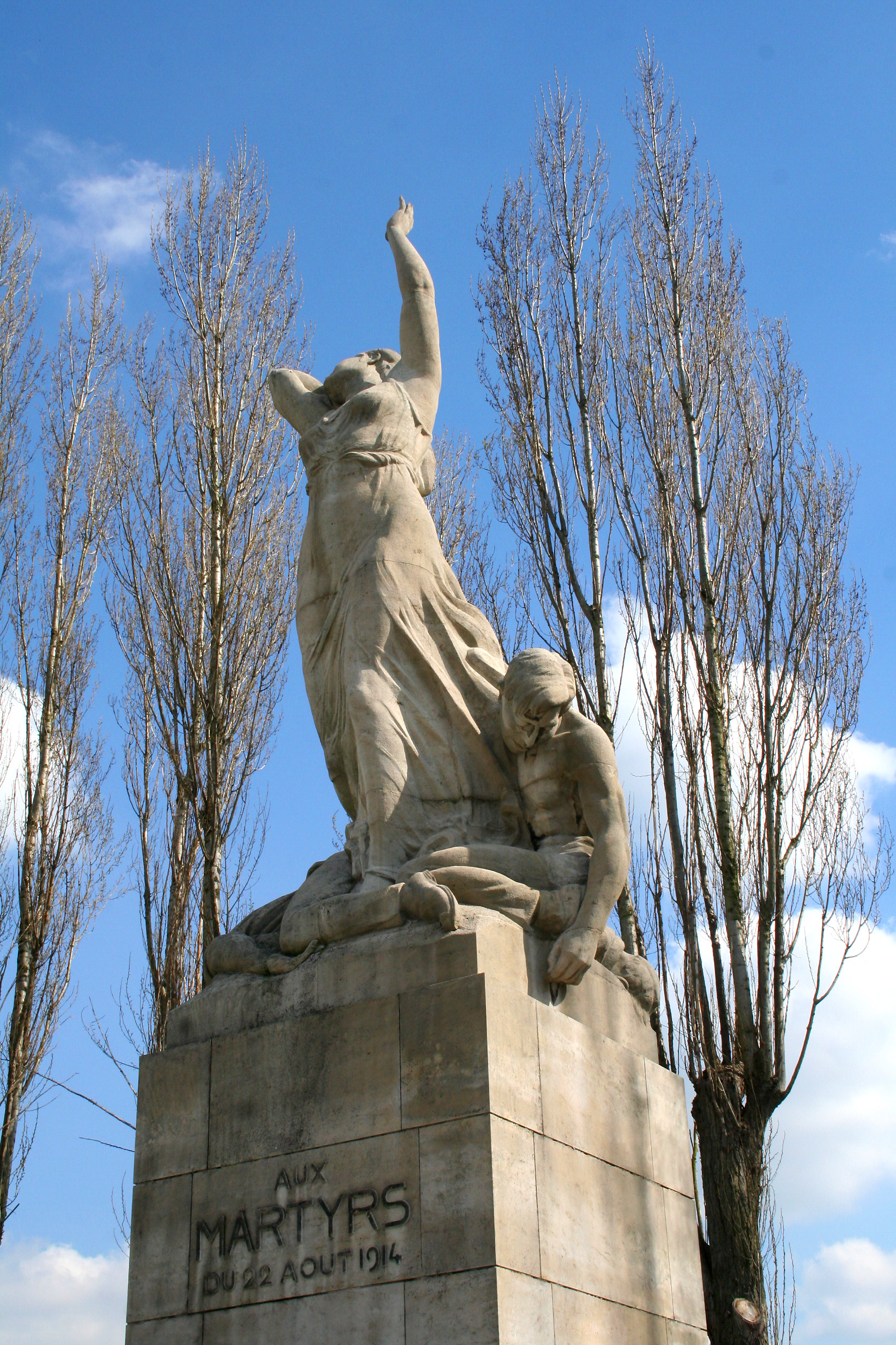 Tamines, le monument érigé en souvenir des victimes du massacre du 22 août 1914. Walon: Tamines, li monumint lèvè è sovnance dès victimes do massacre do 22 d'awous' 1914.